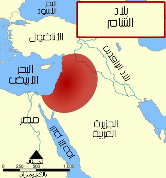 بلاد الشام، أو سورية الطبيعية، وفقًا لخريطة الهلال الخصيب الخاصة بنورمان إينشتاين.